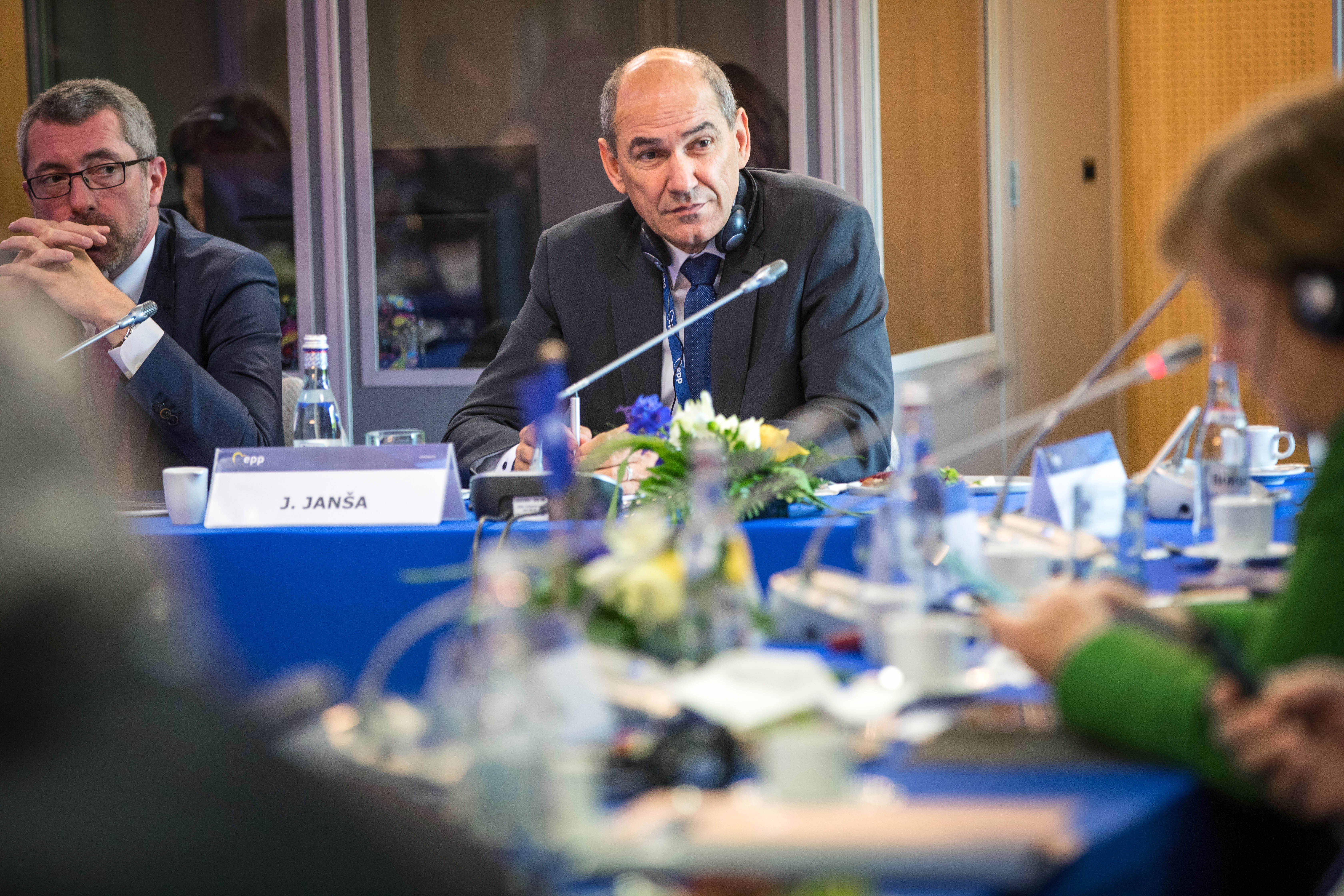 EPP Summit, Sibiu, May 2019